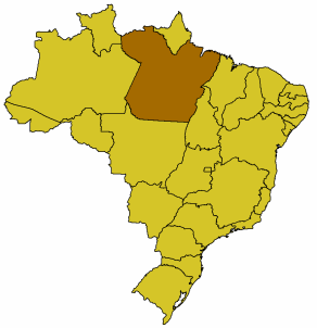 Karte Brasiliens, Pará hervorgehoben